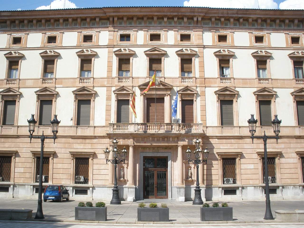 Subdelegación del Gobierno en Lérida (Antiguo Gobierno Civil)